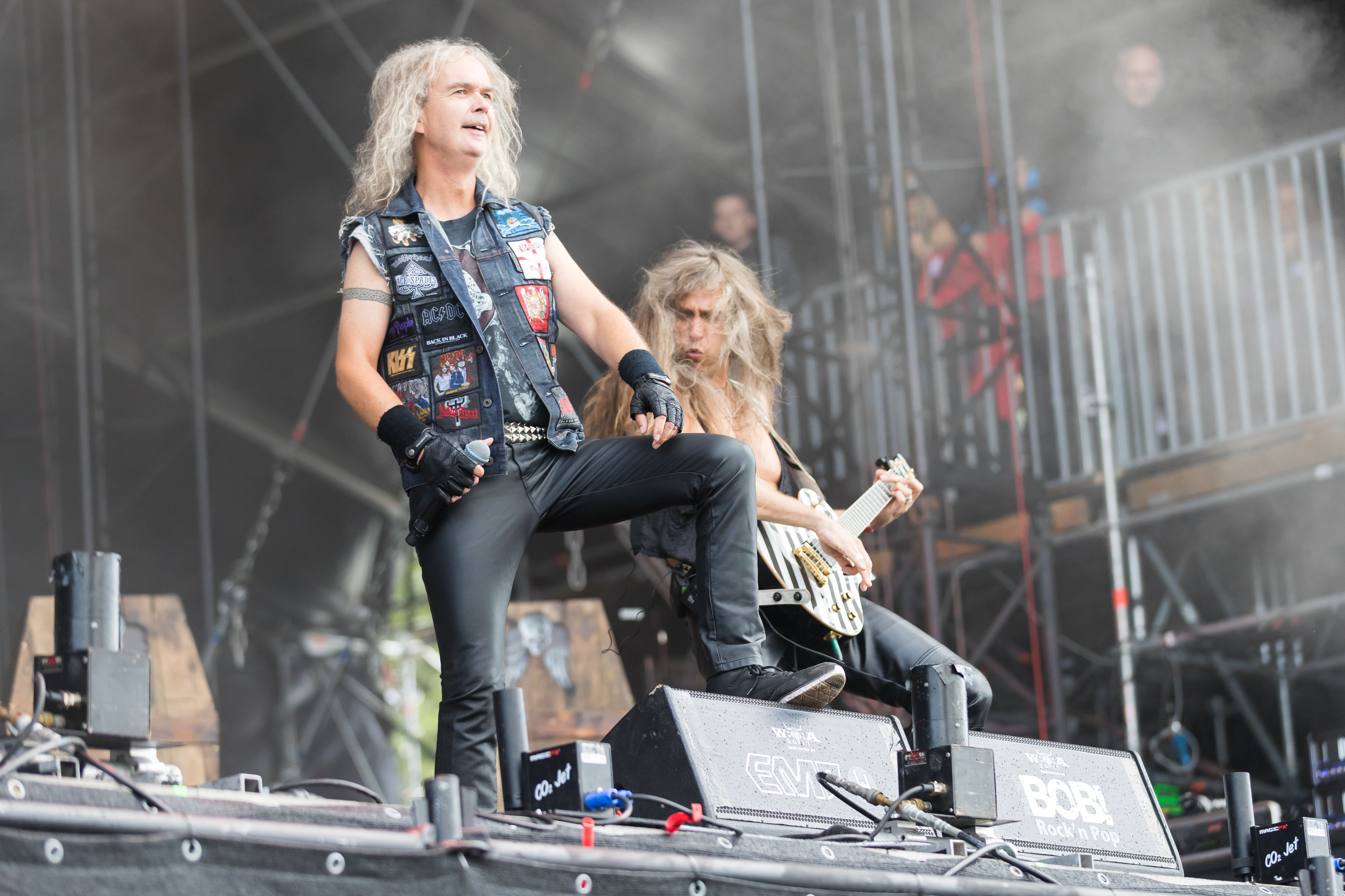 Grave Digger during Wacken Open Air at Schleswig-Holstein, Wacken, , Germany on 2017-08-04, Photo: Sven Mandel